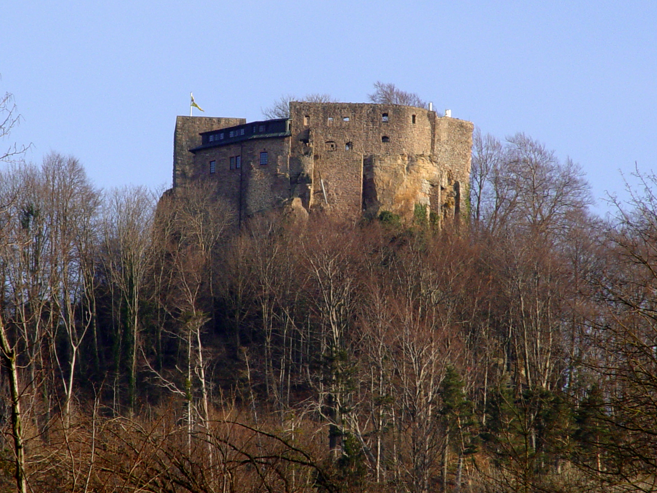 Fotografiert von Martin Dürrschnabel. Alt Ebersteinburg.